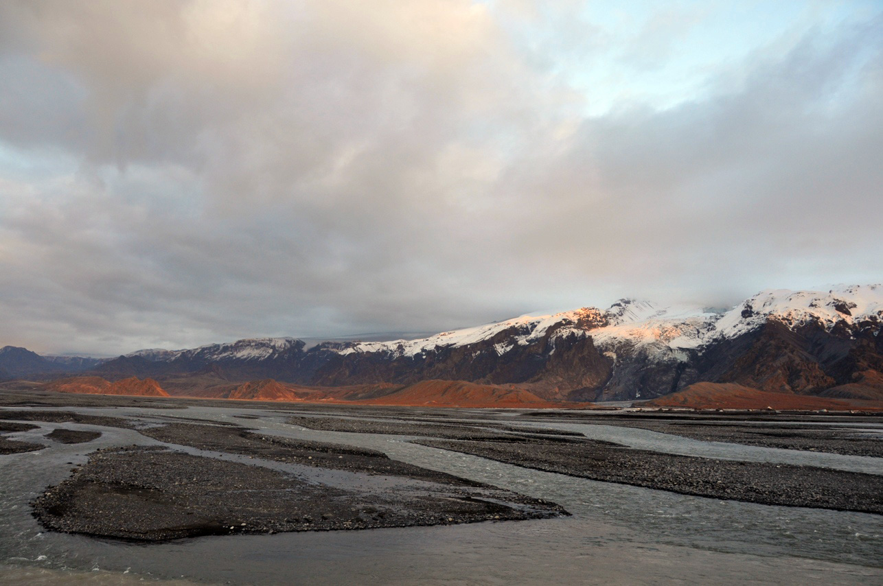 Near Eyjafjallajökull, Iceland